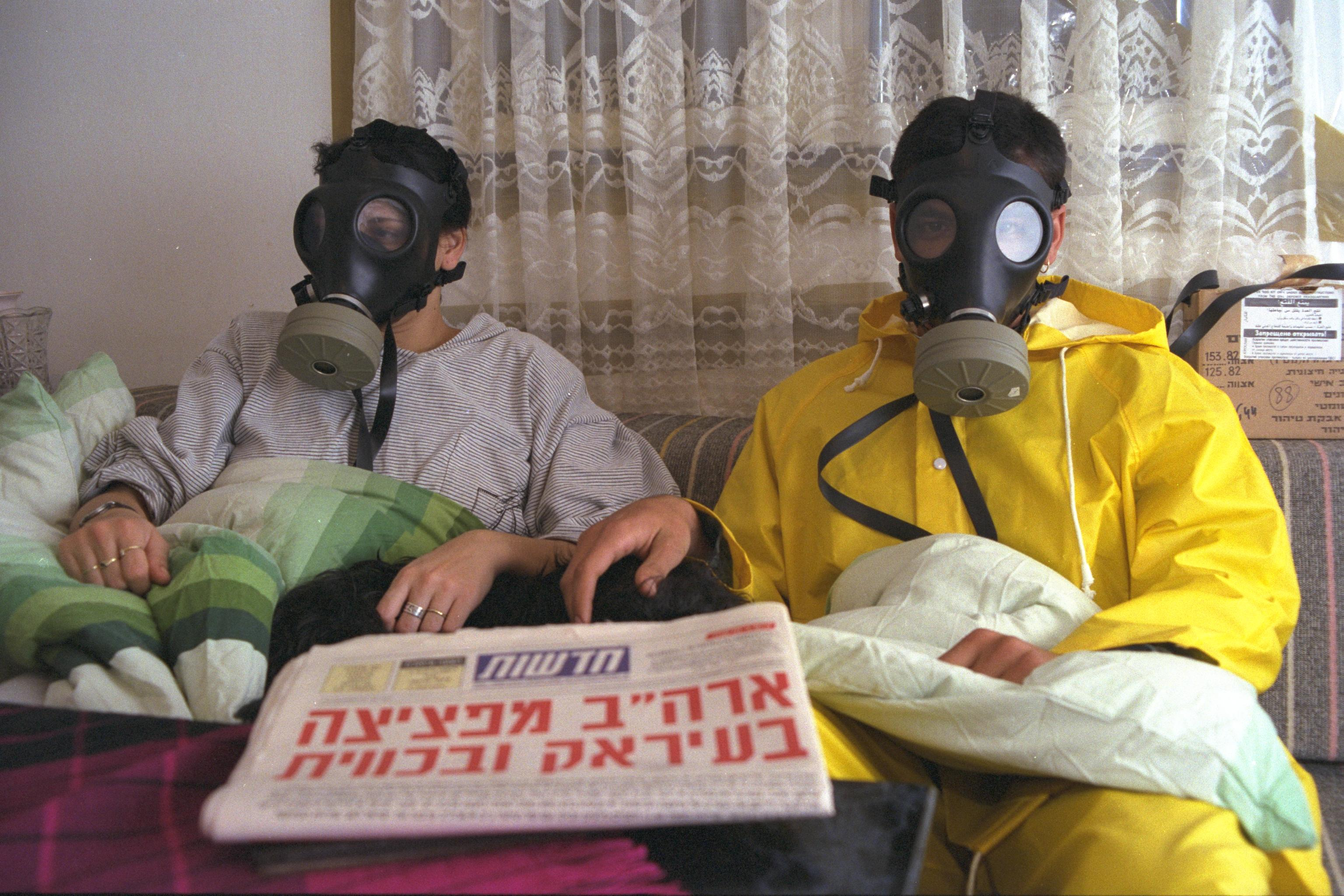 An Israeli family in its sealed room, with gas masks, during an alarm. מלחמת המפרץ. בצילום, משפחה ישראלית בחדר האטום, עם מסכות אב"כ על פניהם, במהלך אזעקת חירום. Photograph: ALPERT NATHAN, GPO. 18/01/1991